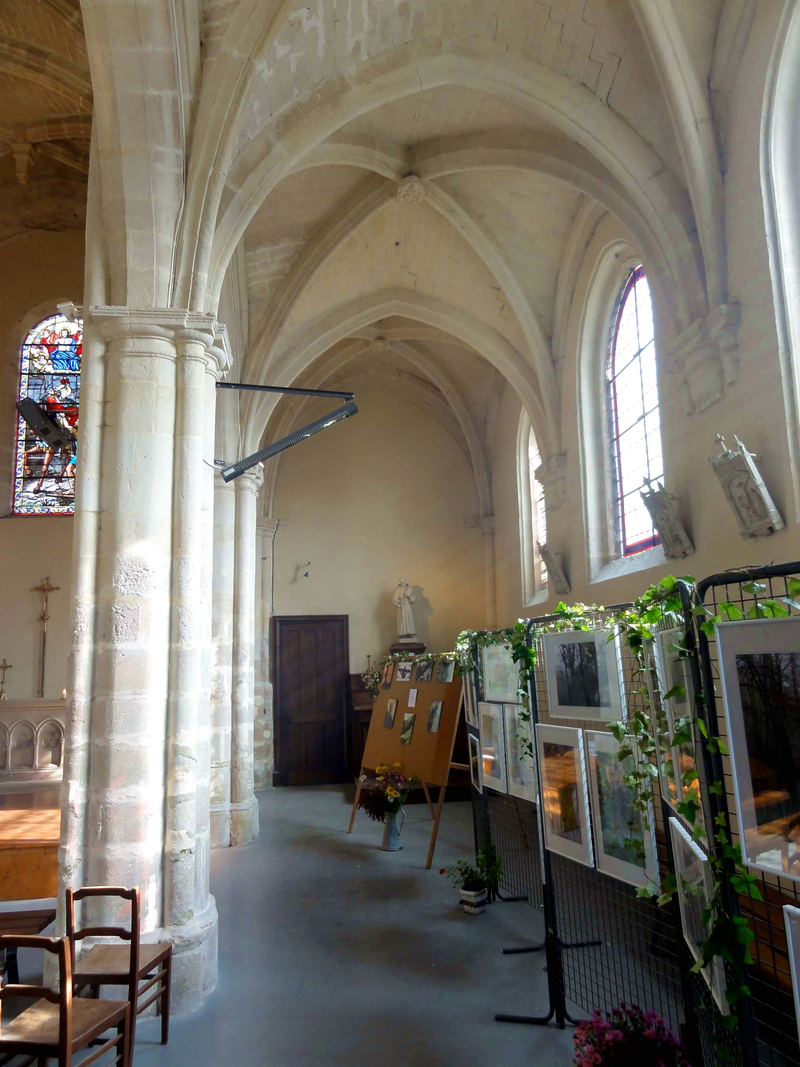 Intérieur de l'église - voir titre.